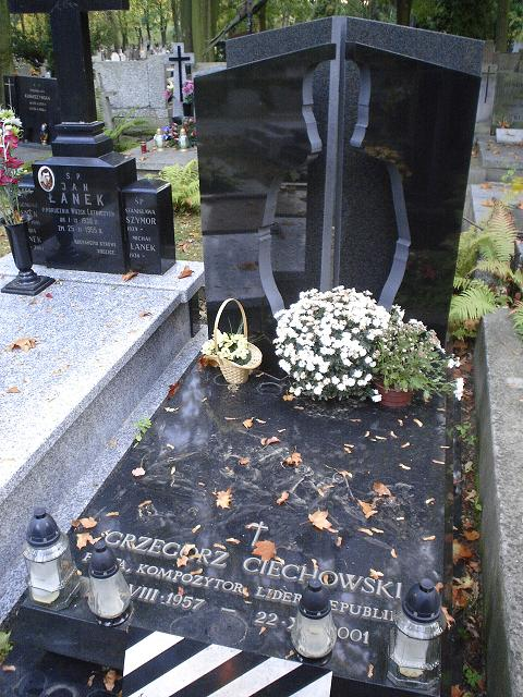 Grób Grzegorza Ciechowskiego na Cmentarzu Wojskowym na Powązkach